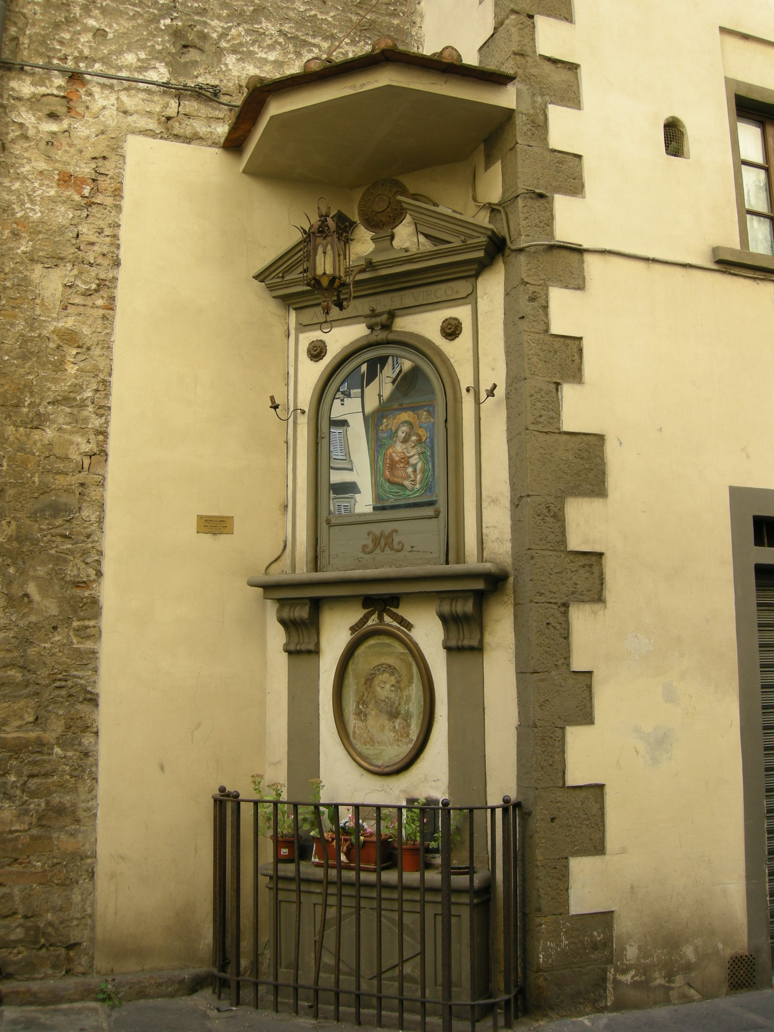 Madonna col bambino e gesù coronato di spine, xix sec., tabernacolo san pancrazio, via della spada